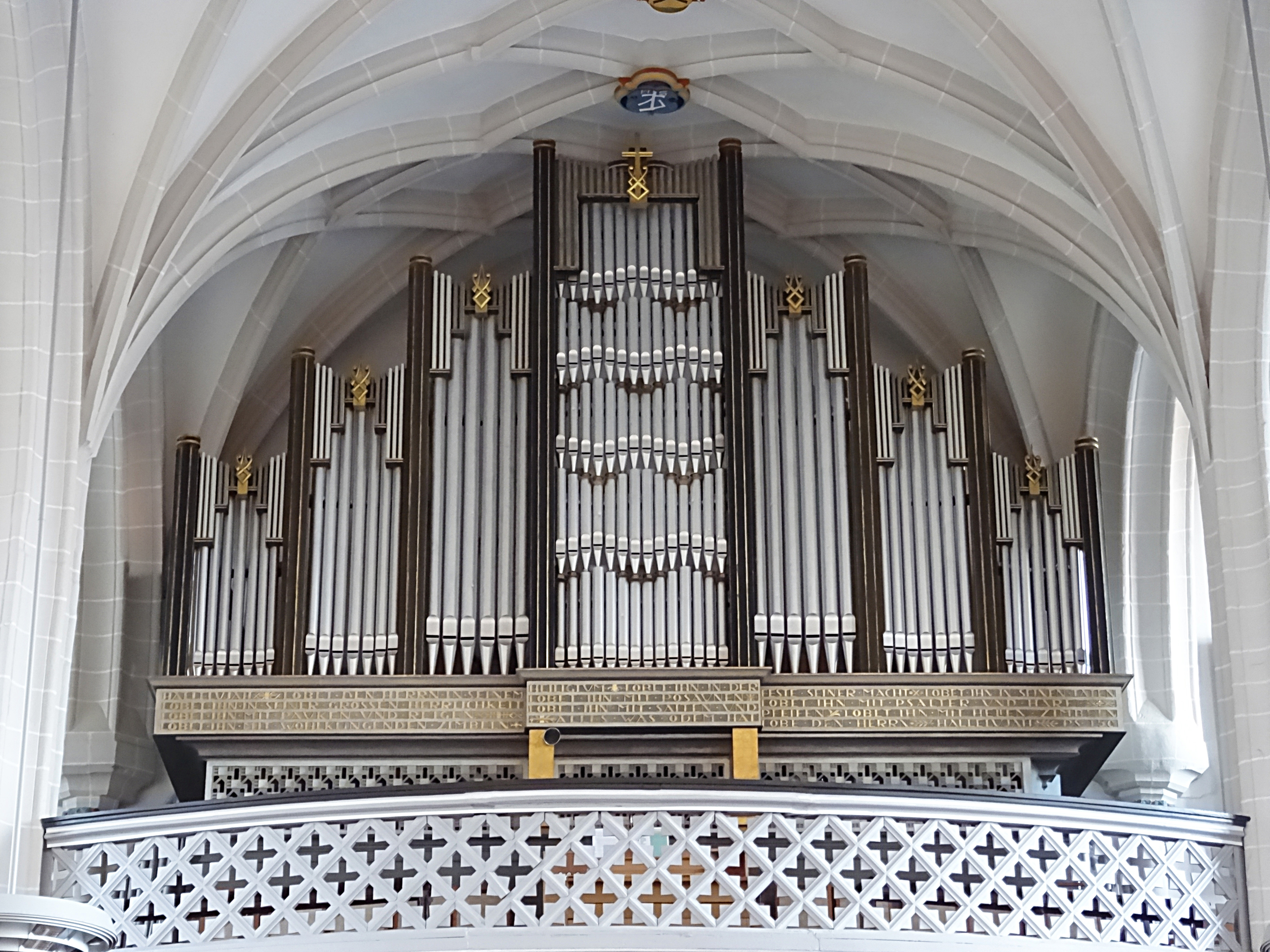 Voigt-Orgel im historischen Orgel-Gehäuse von Wilhelm Rühlmann jun. (1929, Opus 437, damals IIIP/34) in der St. Petri-Pauli-Kirche Eisleben[1][2]